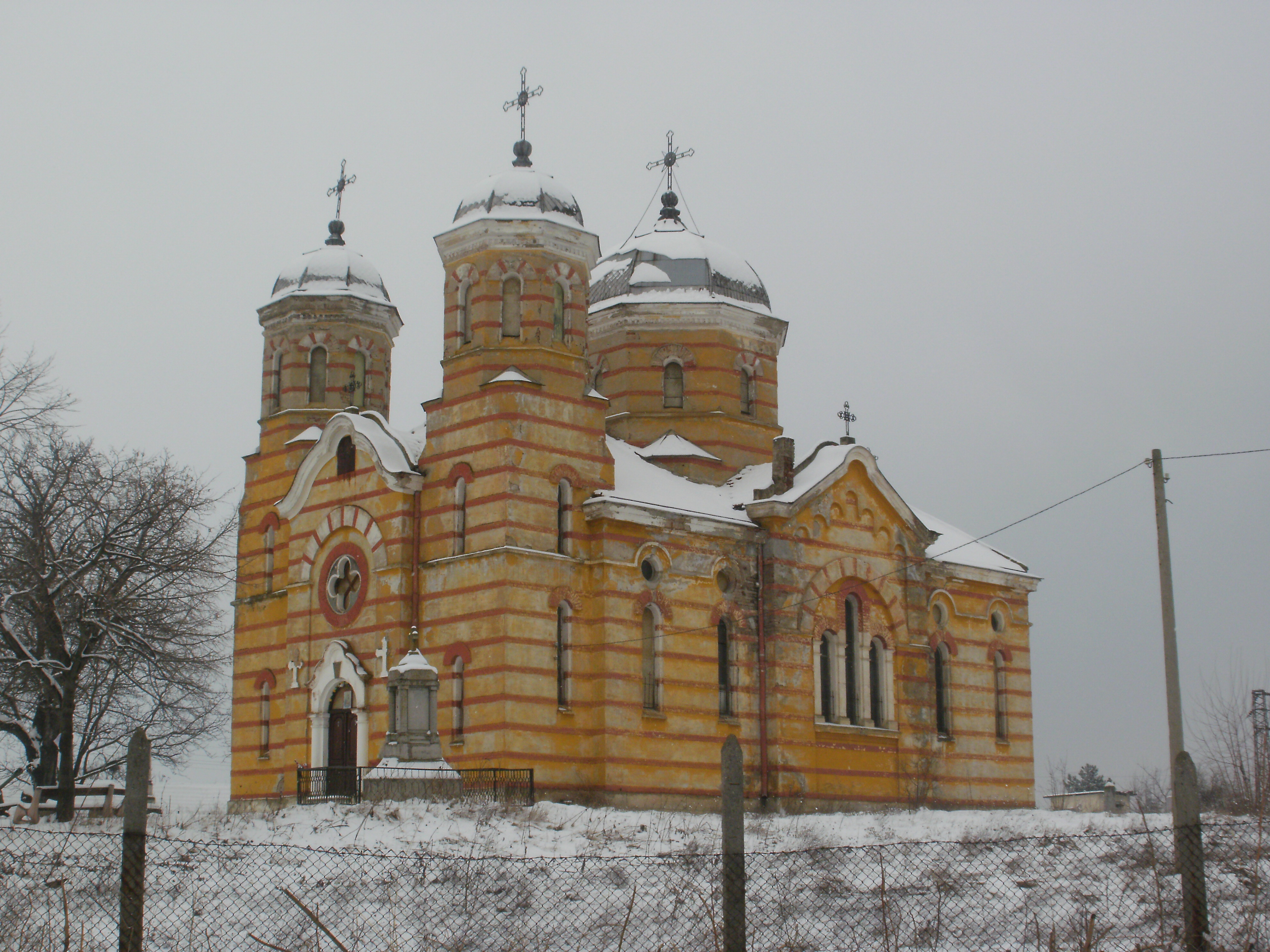 „Успение на Пресвета Богородица“, Сланотрън